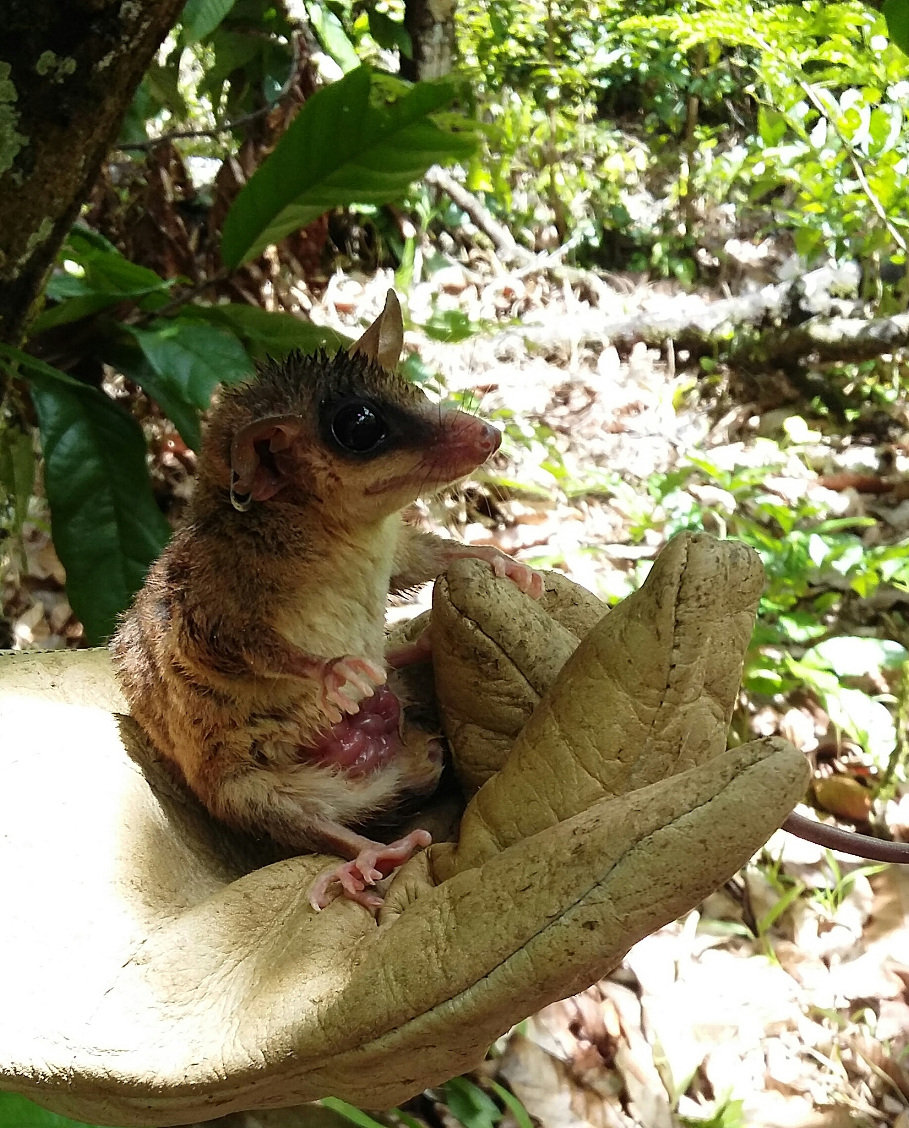 Marmosa murina com filhotes evidentes no marsúpio. Aproximadamente de um dia.